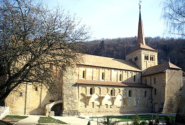 Ehemalige Stiftskirche von Romainmôtier. Überreste des ehemaligen Kreuzgangs sind an der Südmauer sichtbar.